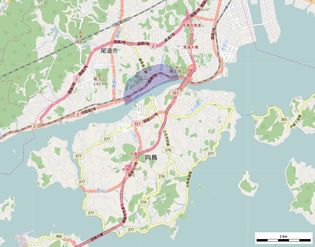 2015年の尾道周辺地図。斜線部が尾道市街地。 This map may be incomplete, and may contain errors. Don't rely solely on it for navigation.